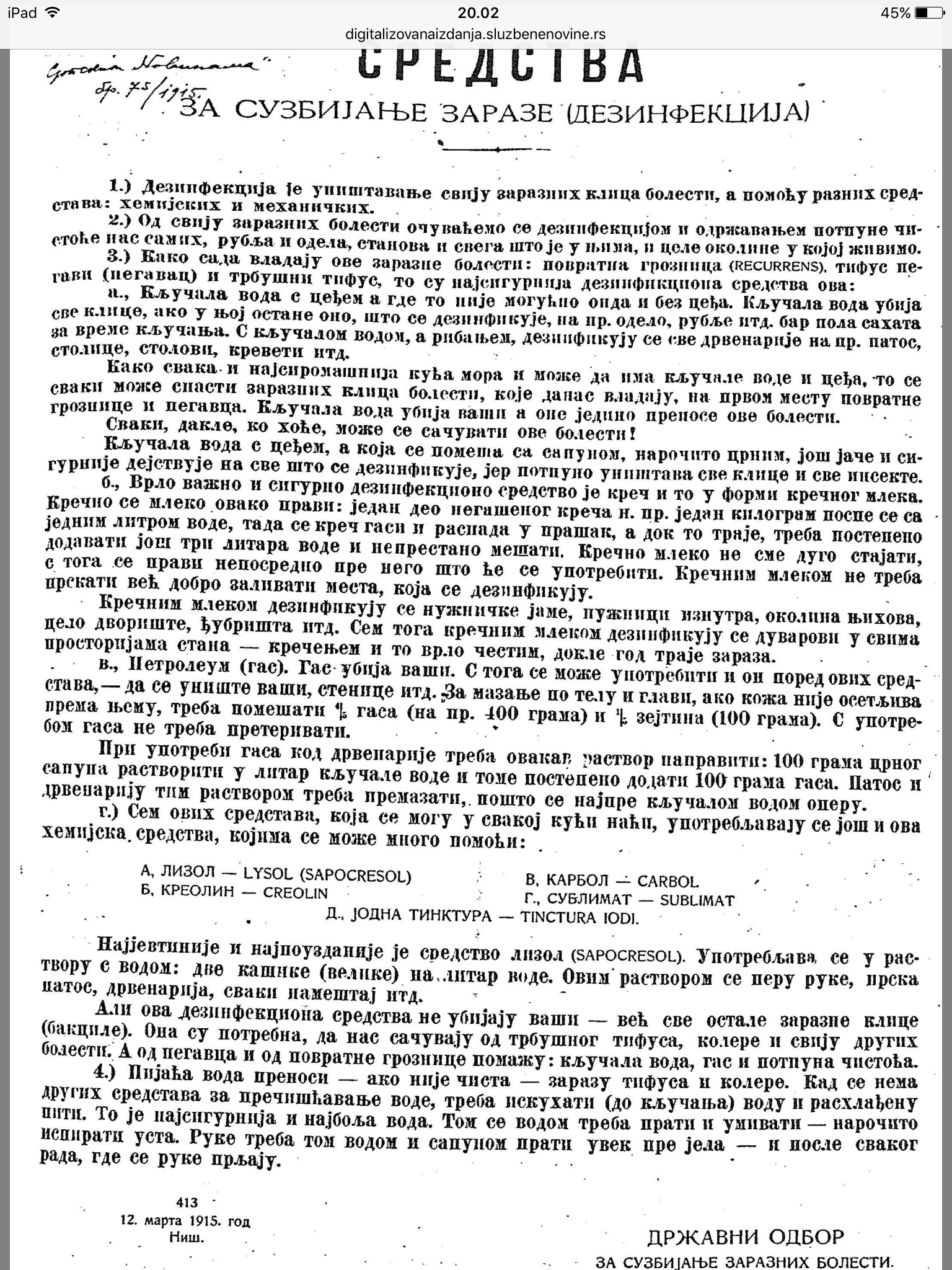 Proglas Državnog odbora za sudbijanje zaraznih bolesti od 12. 3. 1915